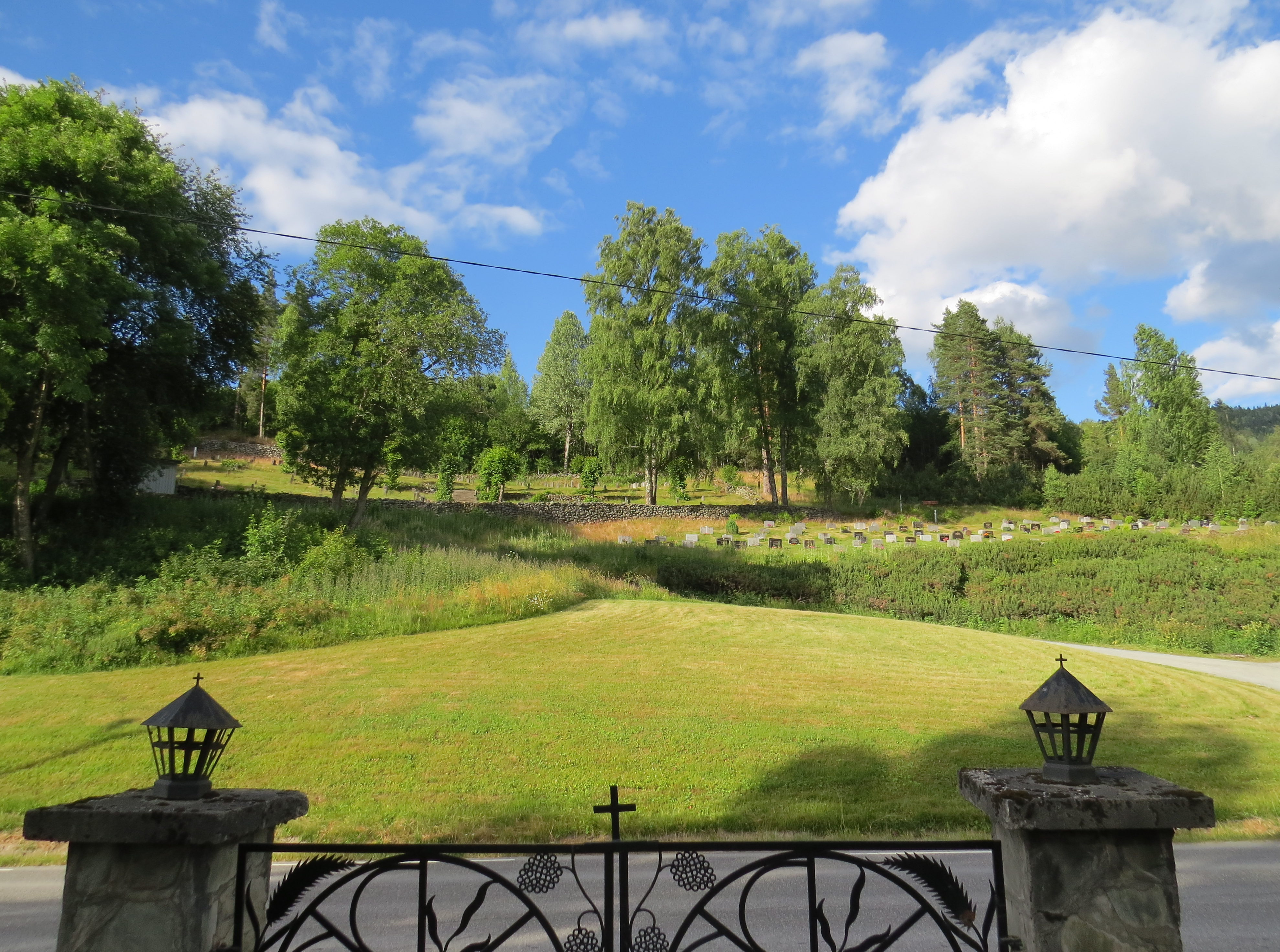 Kviteseid kirkegård, Telemark, Norge